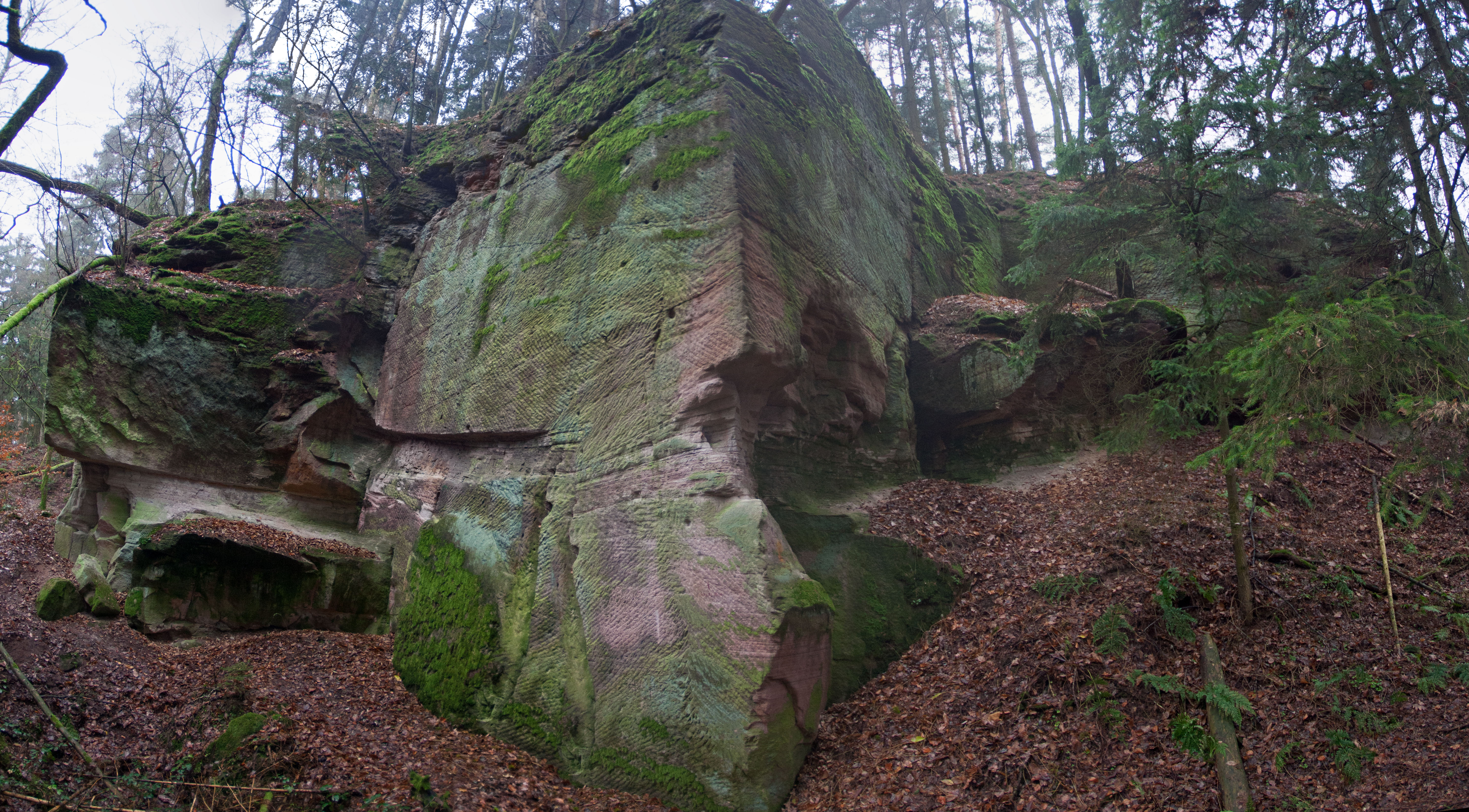 Steinbrüche im Fürther Stadtwald